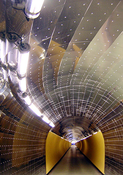 Brunkebergstunneln